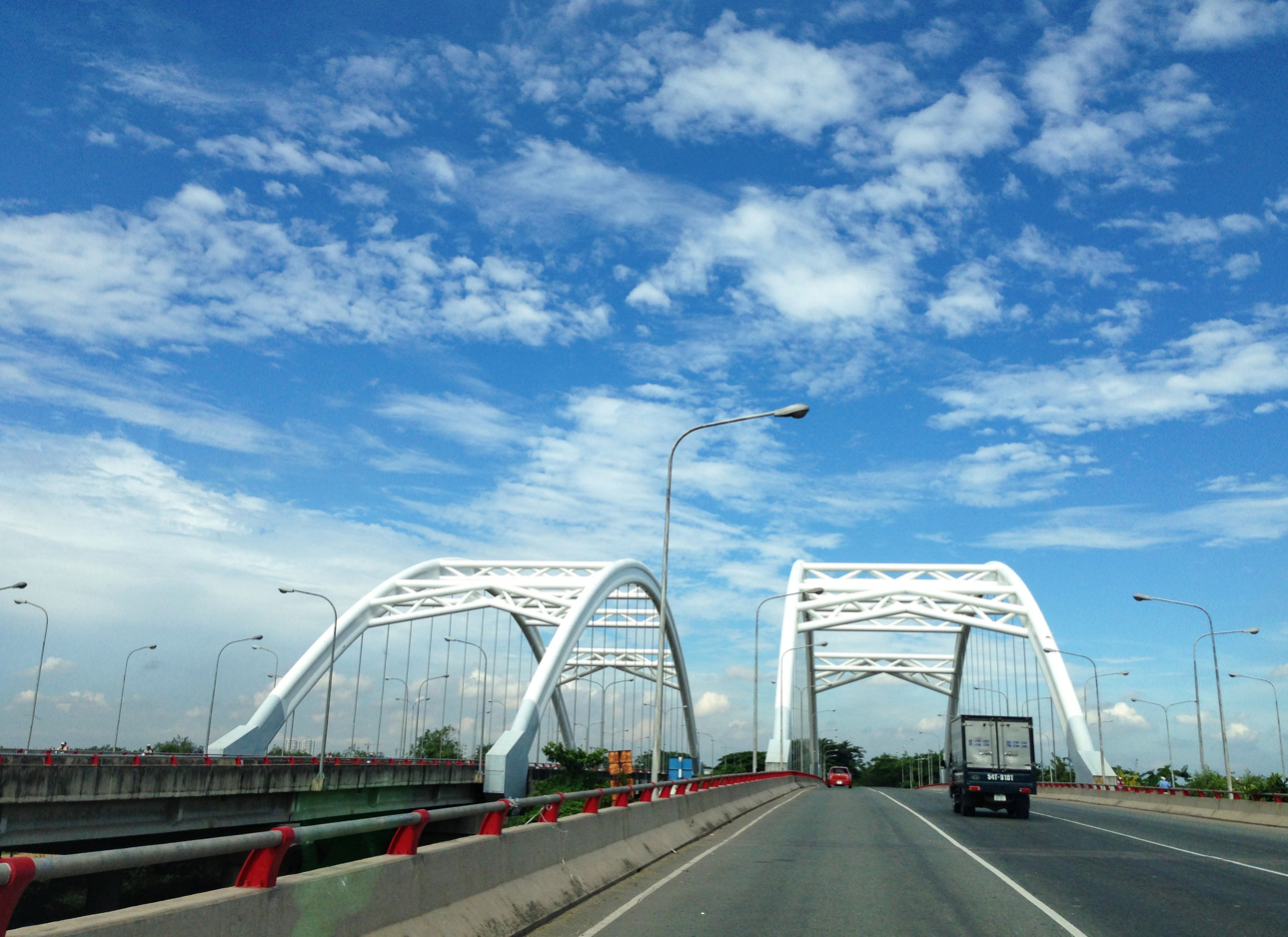 Rach hiep An, nguyen van linh, Binh hung, Binh chanh, hcmvn